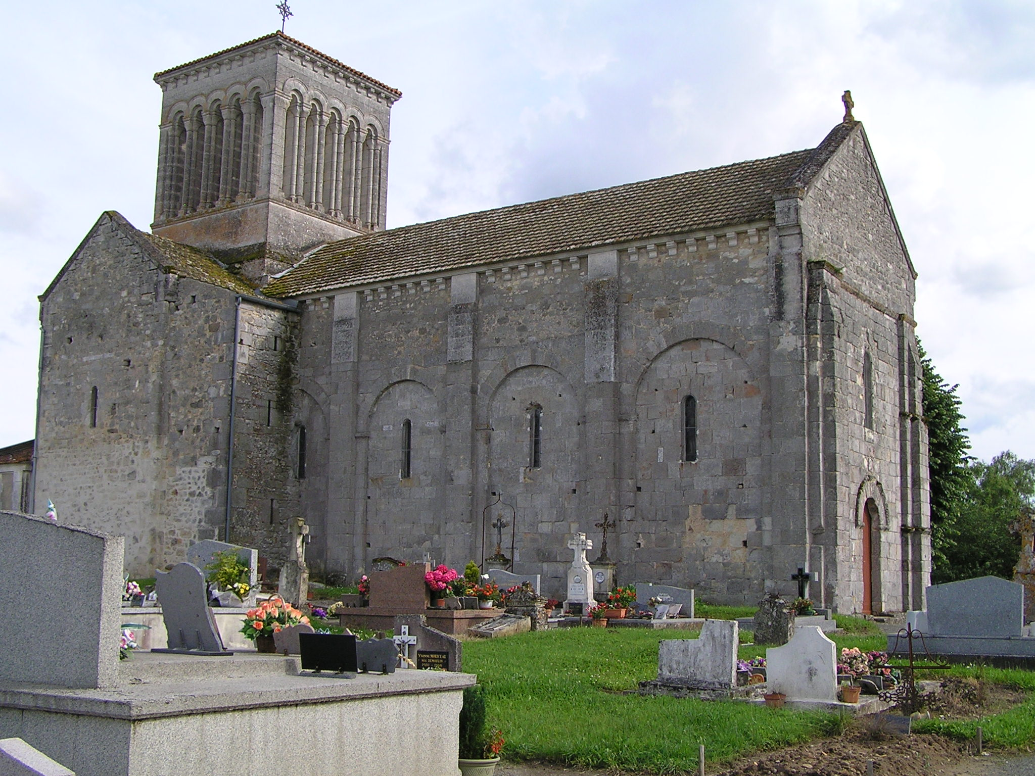 église de Passirac, Charente, France